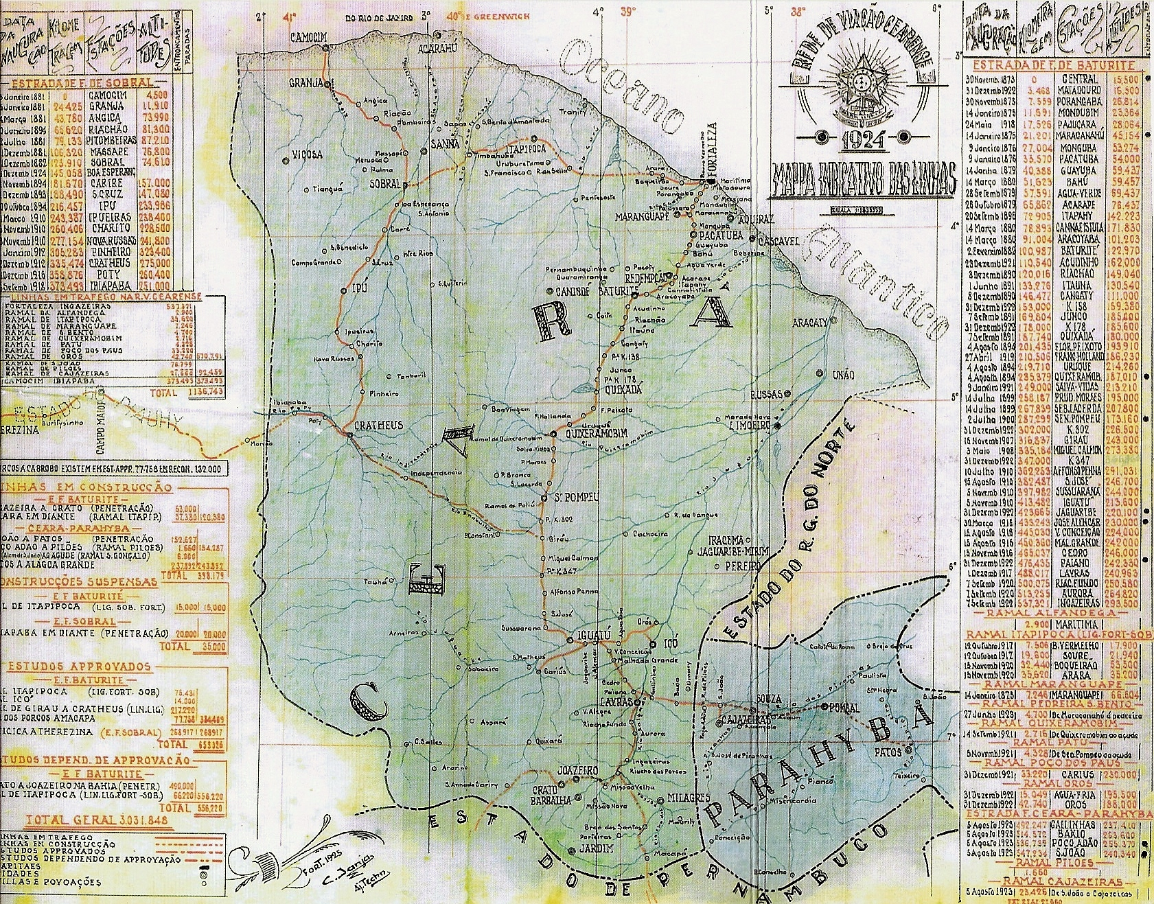 Mapa da Rede de Viação Cearense de 1924 por C. Janja.